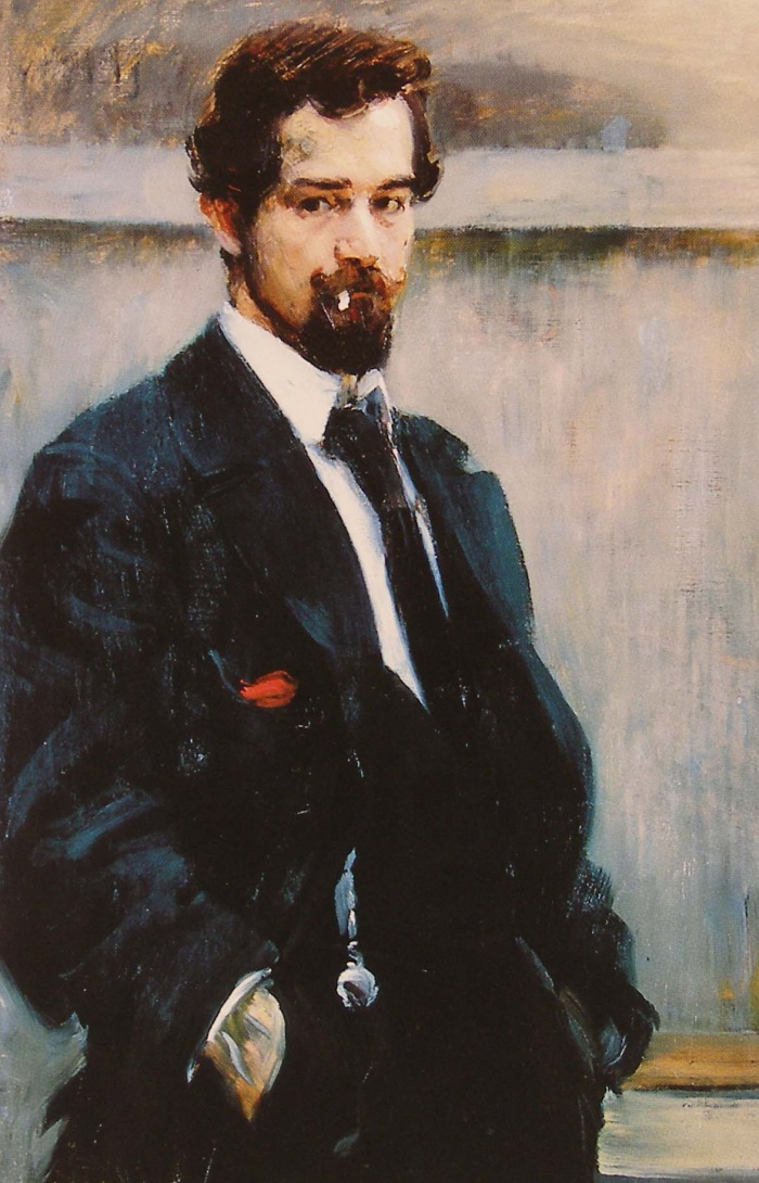 Jan Preisler, selfportrait